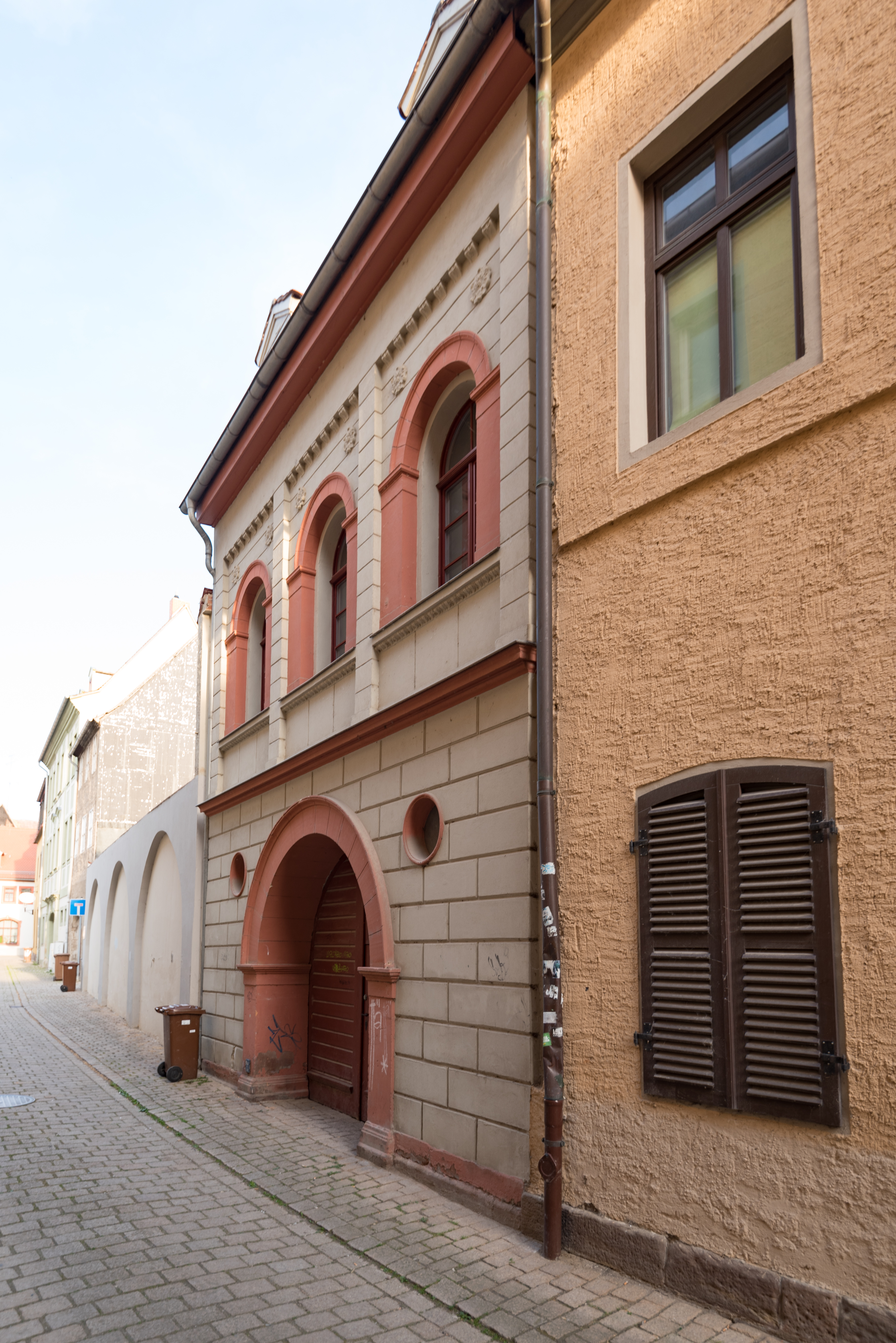 Naumburg (Saale), Mariengasse 11